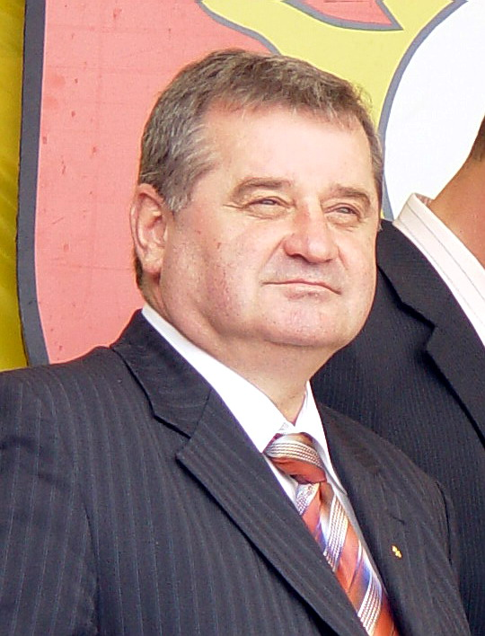 Adam Pałys, poseł świętokrzyski, gość dożynek w Nowym Folwarku, 2 września 2007 r.